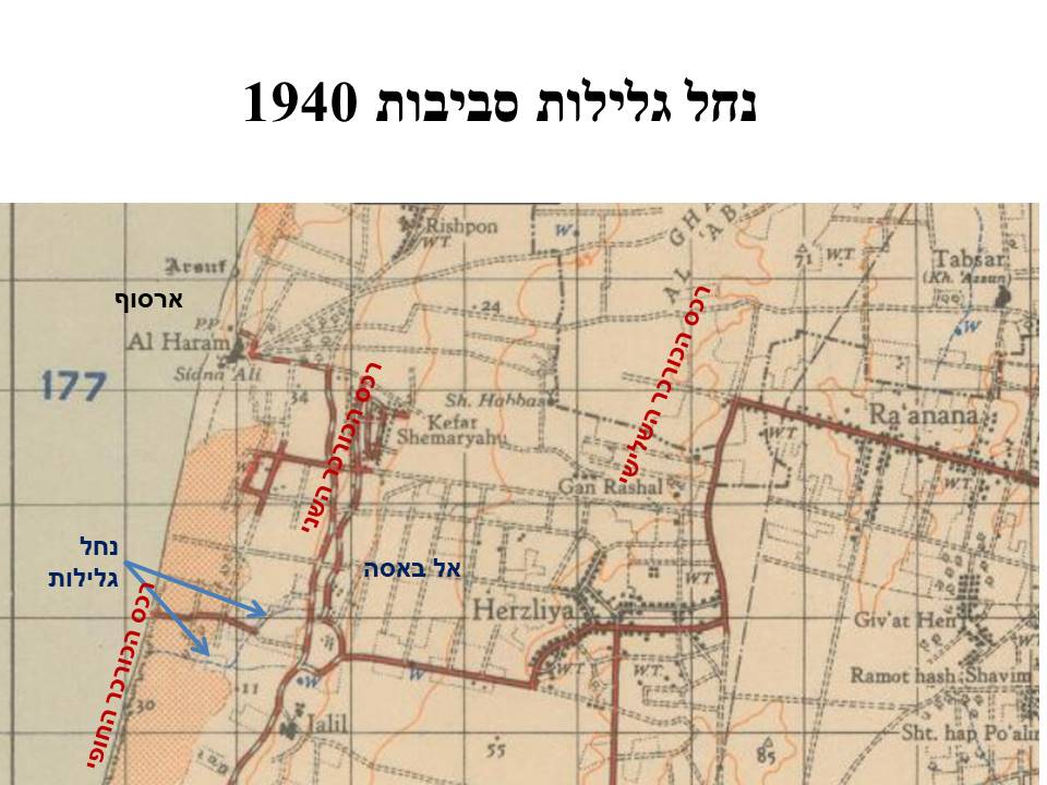 נחל גלילות במפה מנדטורית בסביבות 1940